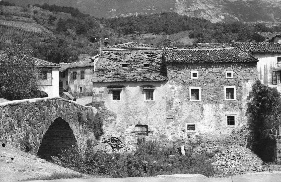 Kapučinova stara hiša, Podbreg.